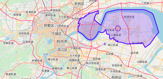 中文（中国大陆）: 钱塘新区在杭州市的位置